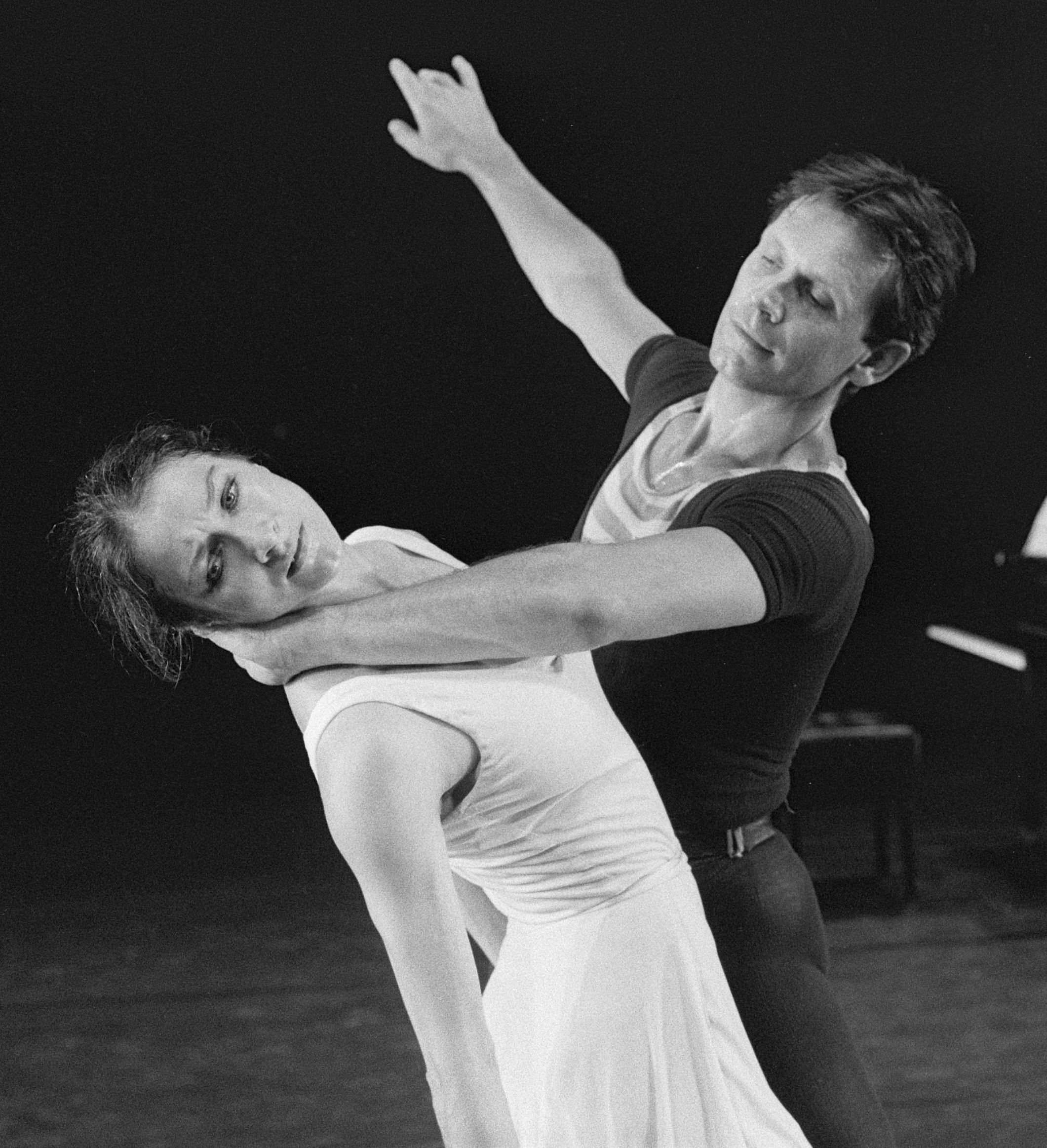 Alexandra Radius en Han Ebbelaar 25 jaar danspaar; tijdens repetities (duet voor Ballet en Muziek) in de Koninklijke Schouwburg in Den Haag